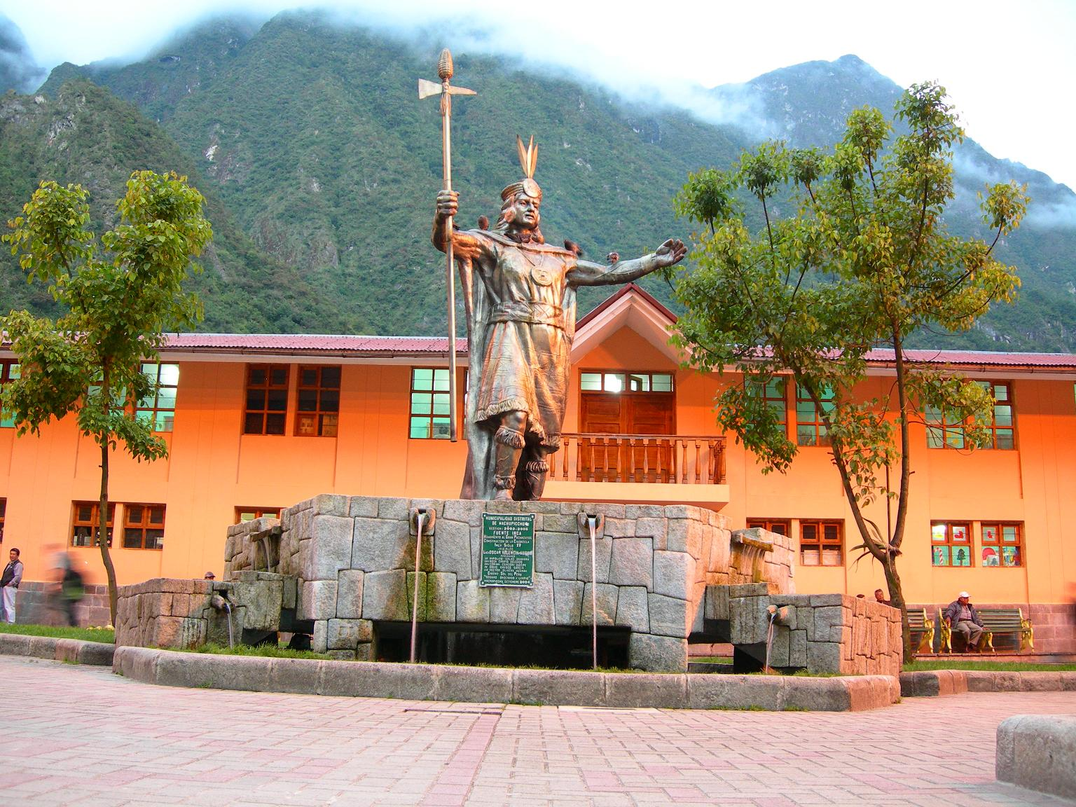 Plaza de armas de la localidad de Aguas Calientes (Perú)